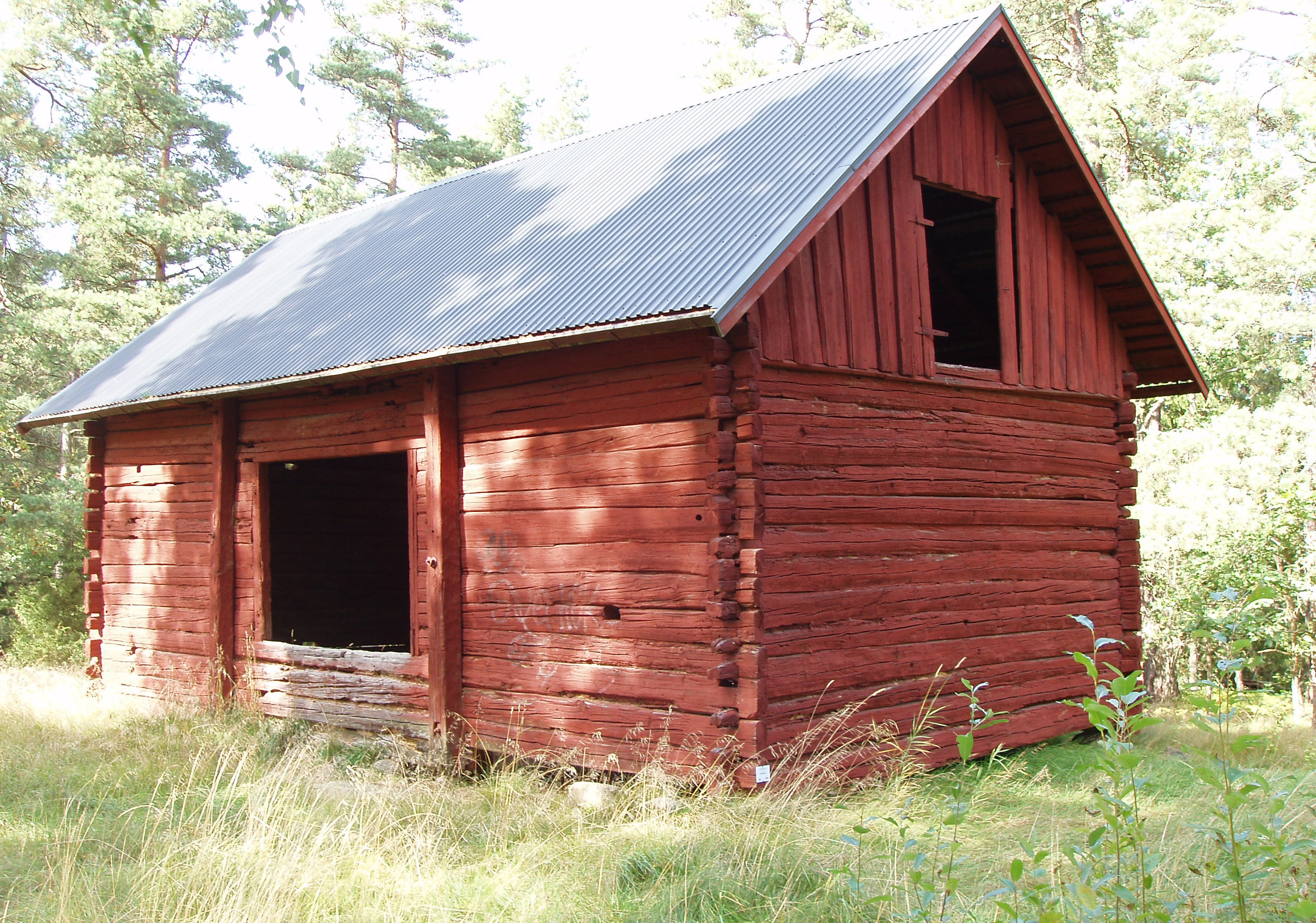 Hölada vid Stockby på Lidingö. En av de äldsta bevarade träbyggnaderna på Lidingö. Formodligen från slutet av 1700-talet eller i början av 1800-talet. Endast yttertaket har bytts ut till plåttak. Se även Höladan takstolar.